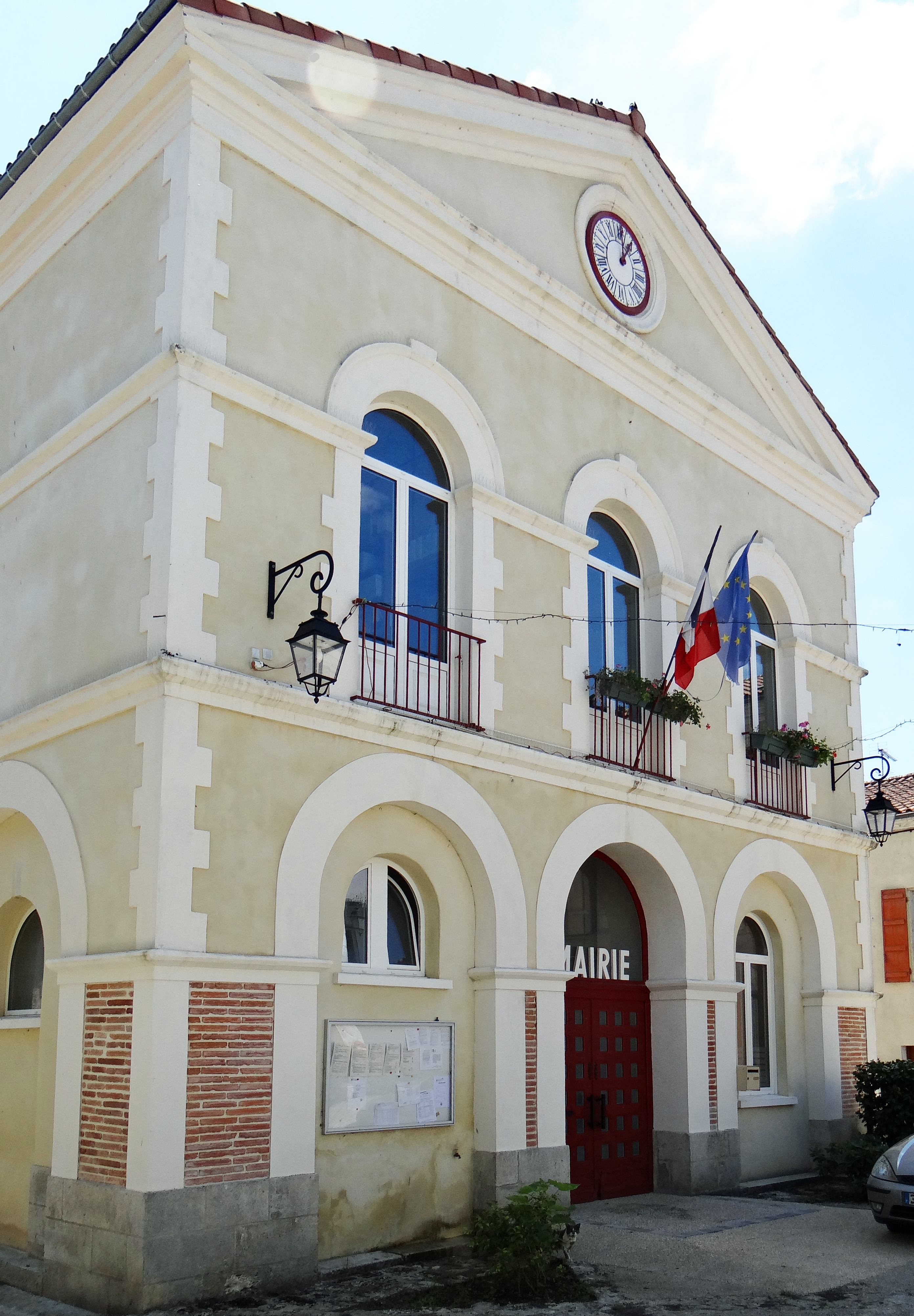 La Sauvetat-de-Savères - Mairie